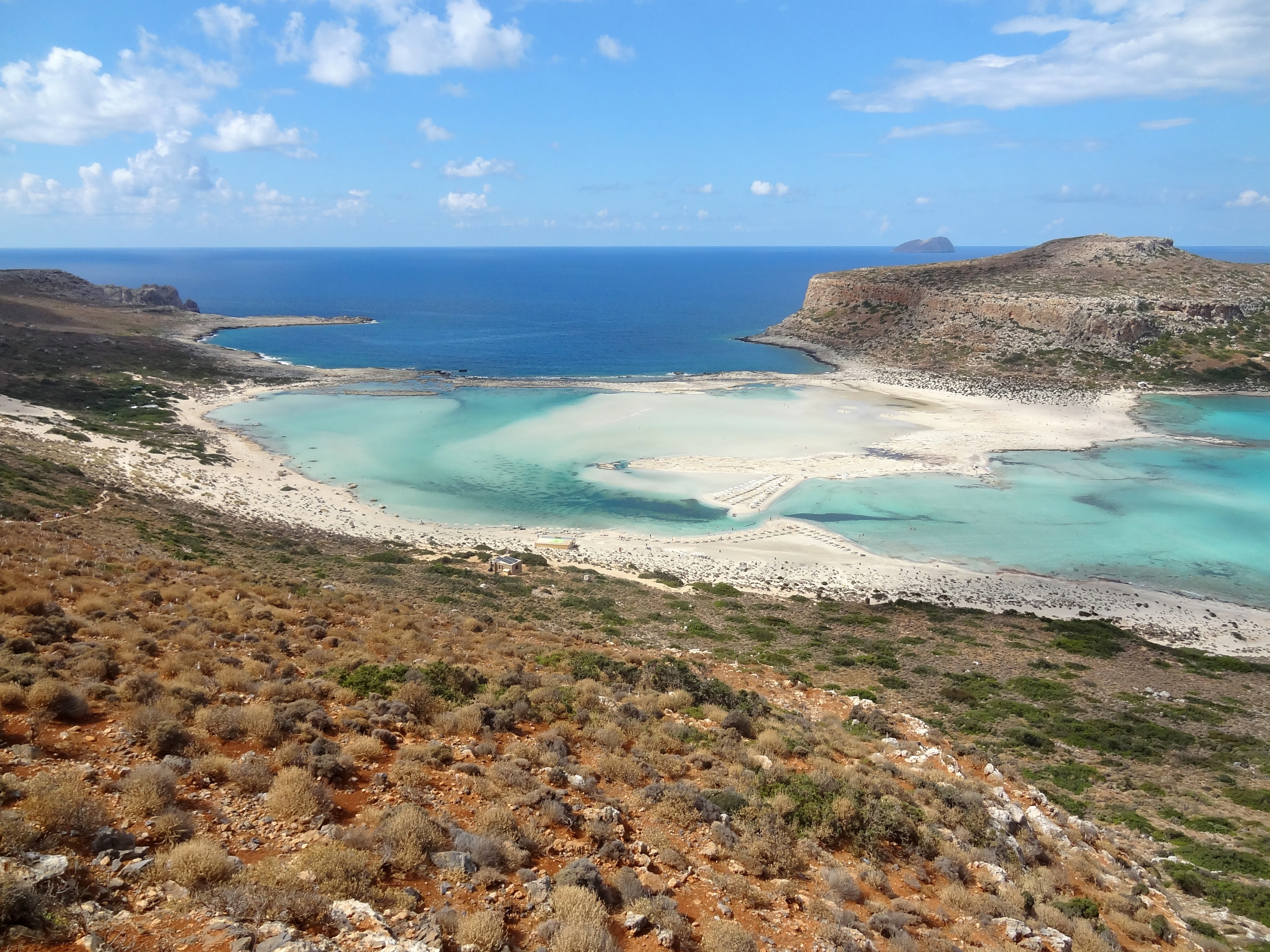 Strand von Balos (Μπάλος) auf der Halbinsel Gramvousa, Gemeinde Kissamos, Regionalbezirk Chania, Kreta, Griechenland